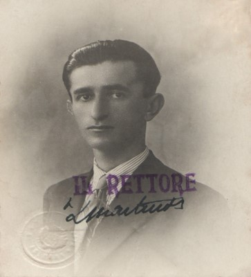 Adem Beli